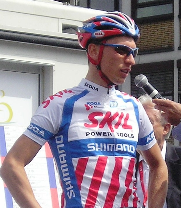 Karsten Migels interviewt Robert Wagner vor dem Start der DM Straße am 29. Juni 2008 in Bochum